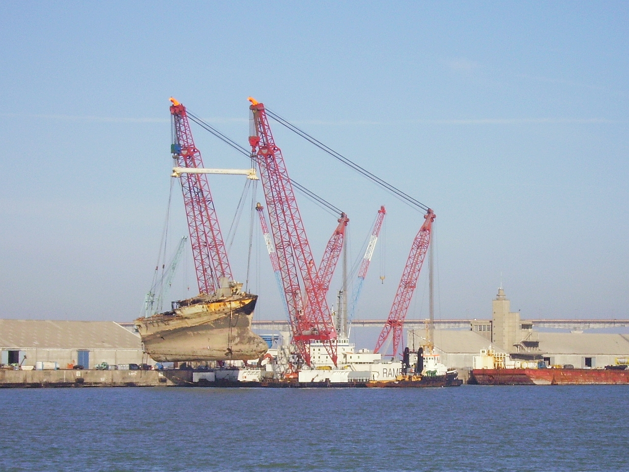 La barge-grue Rambiz au port de La Rochelle-Pallice le 31 octobre 2007. IMO Number: 9136199 MMSI Number: 205132000 Callsign: ORKA Length: 85.46 m Beam: 44.40 m